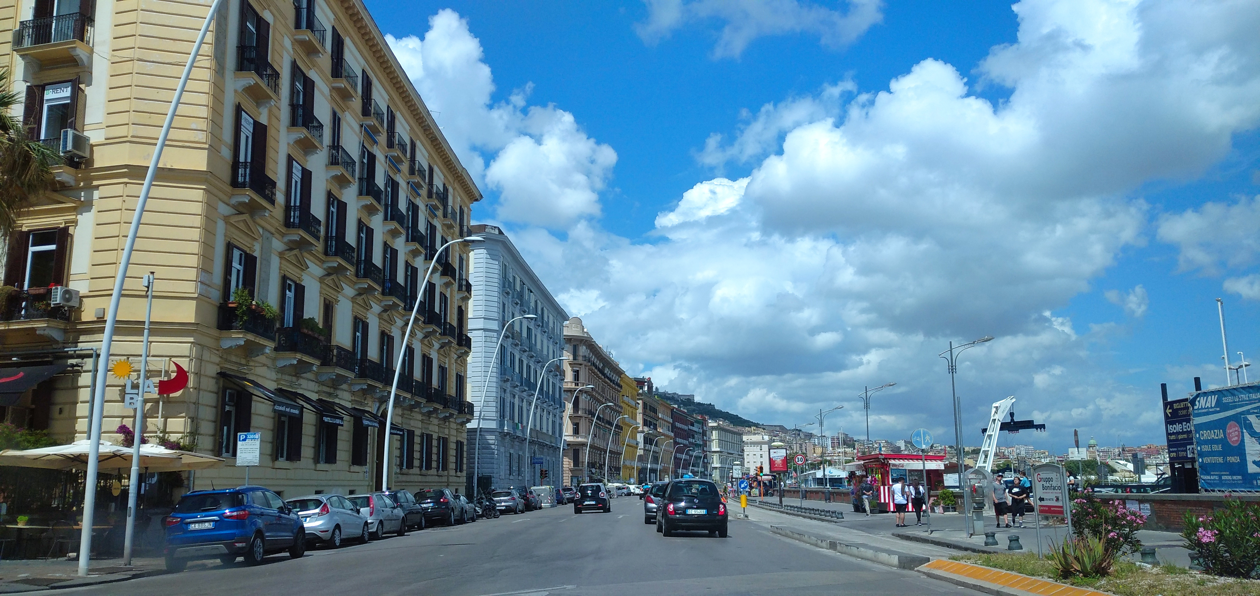 Via Caracciolo